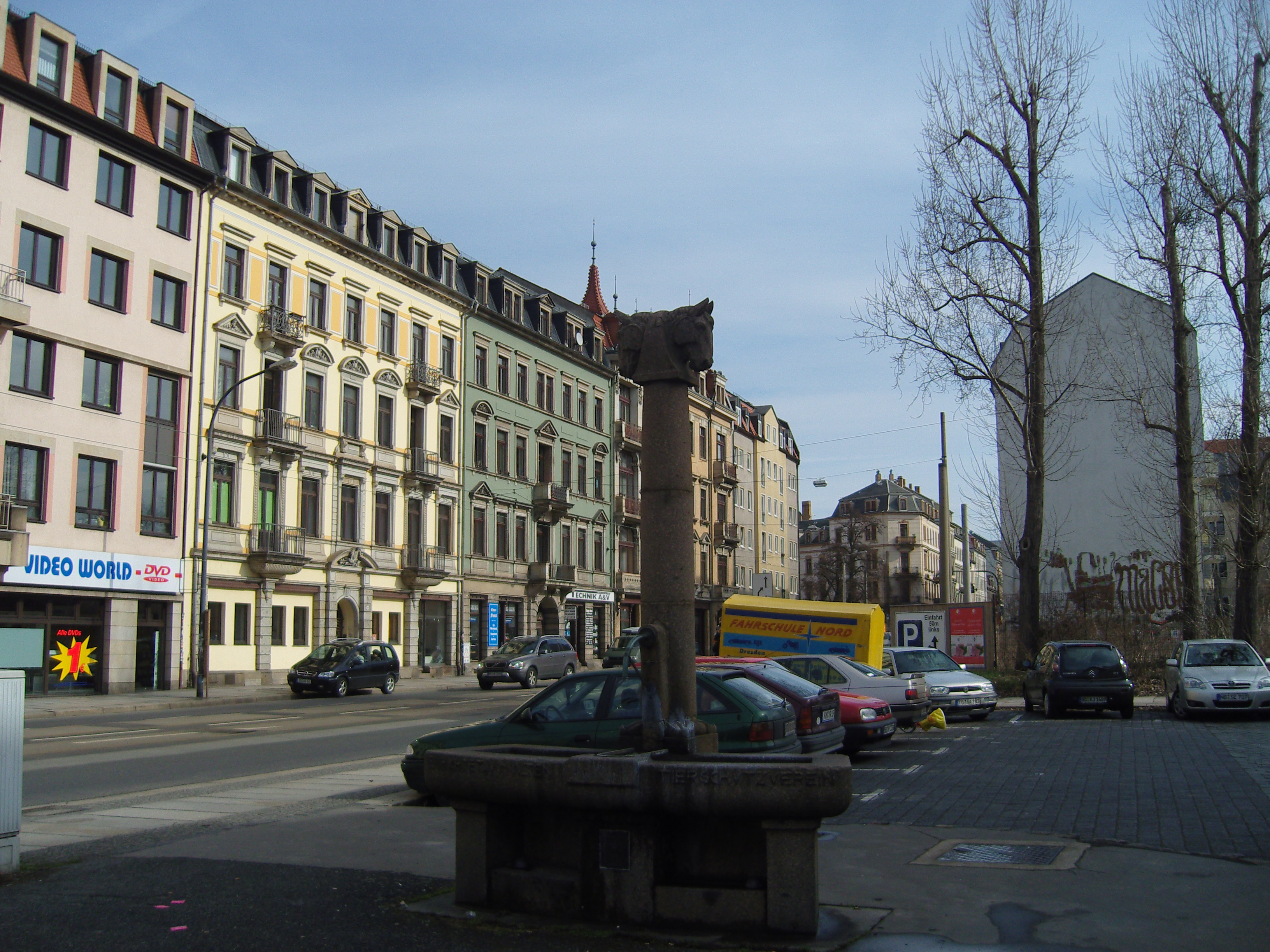 Pferdebrunnen von Paul Polte an der Bautzner Straße in der Äußeren Neustadt in Dresden